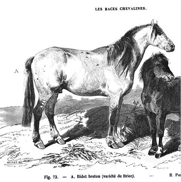 Bidet Breton de Briec publié dans La connaissance générale du cheval en 1861